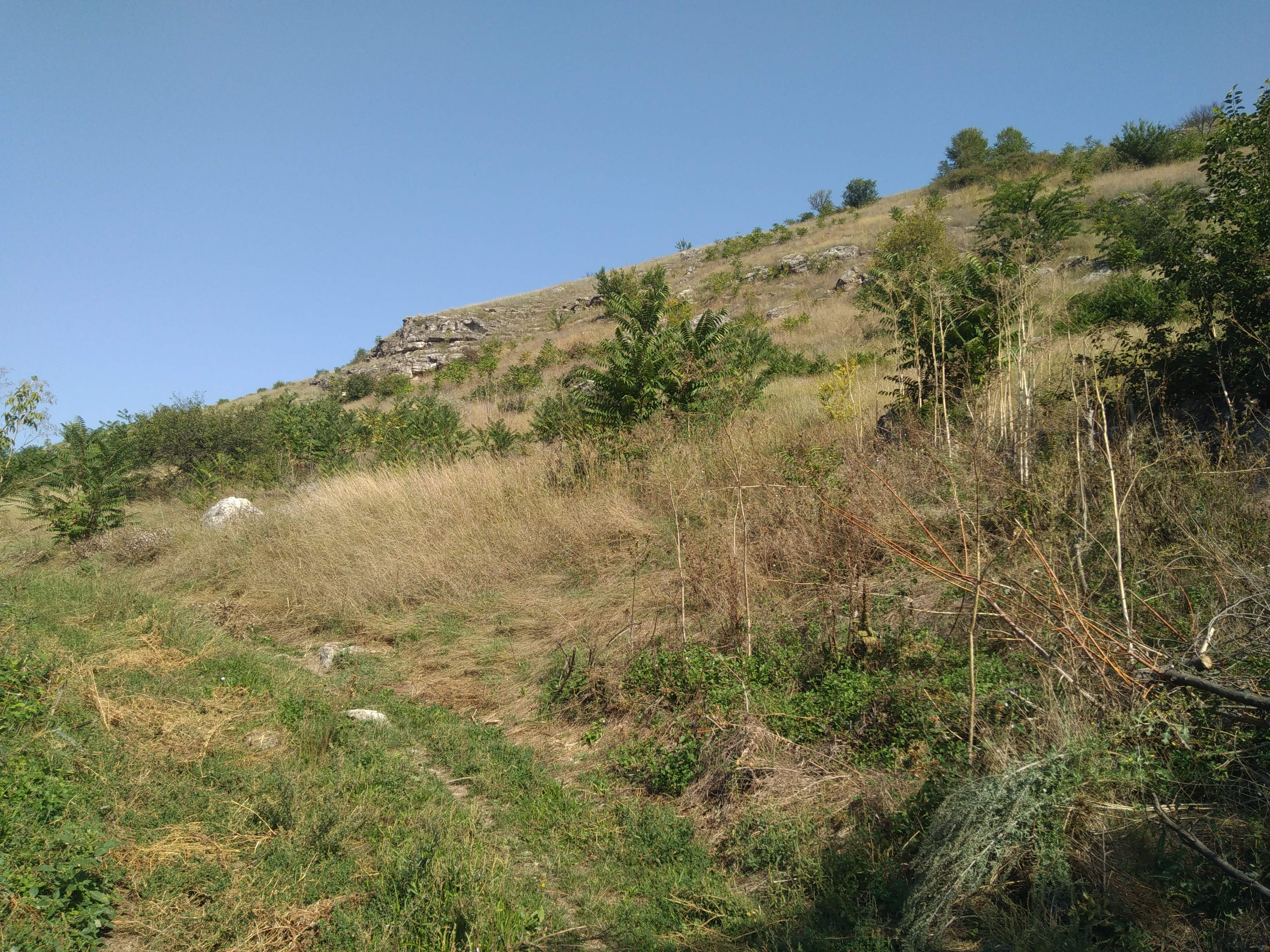 Defileul Orhei, monument al naturii amplasat în raionul Orhei, orașul Orhei (cod MD-OR-mn.A-055) A-055